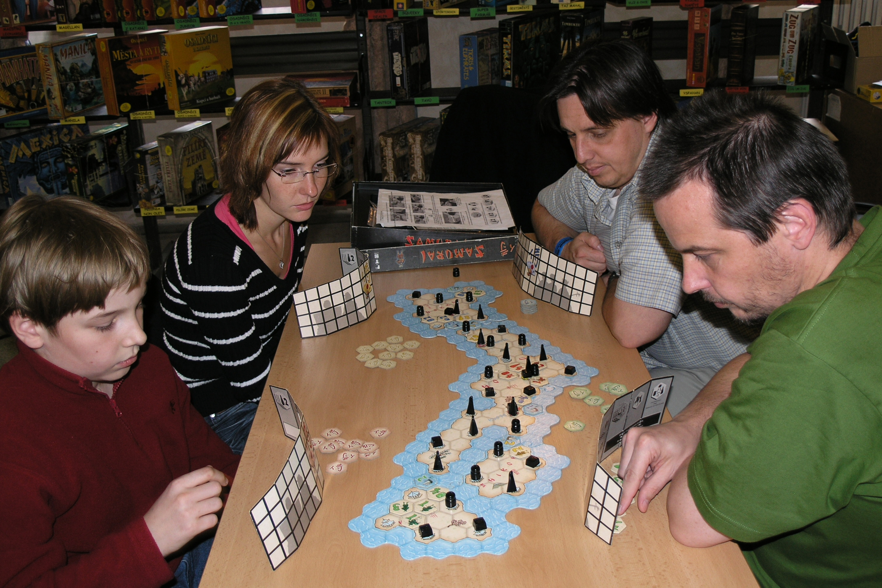 Deskohraní 2008